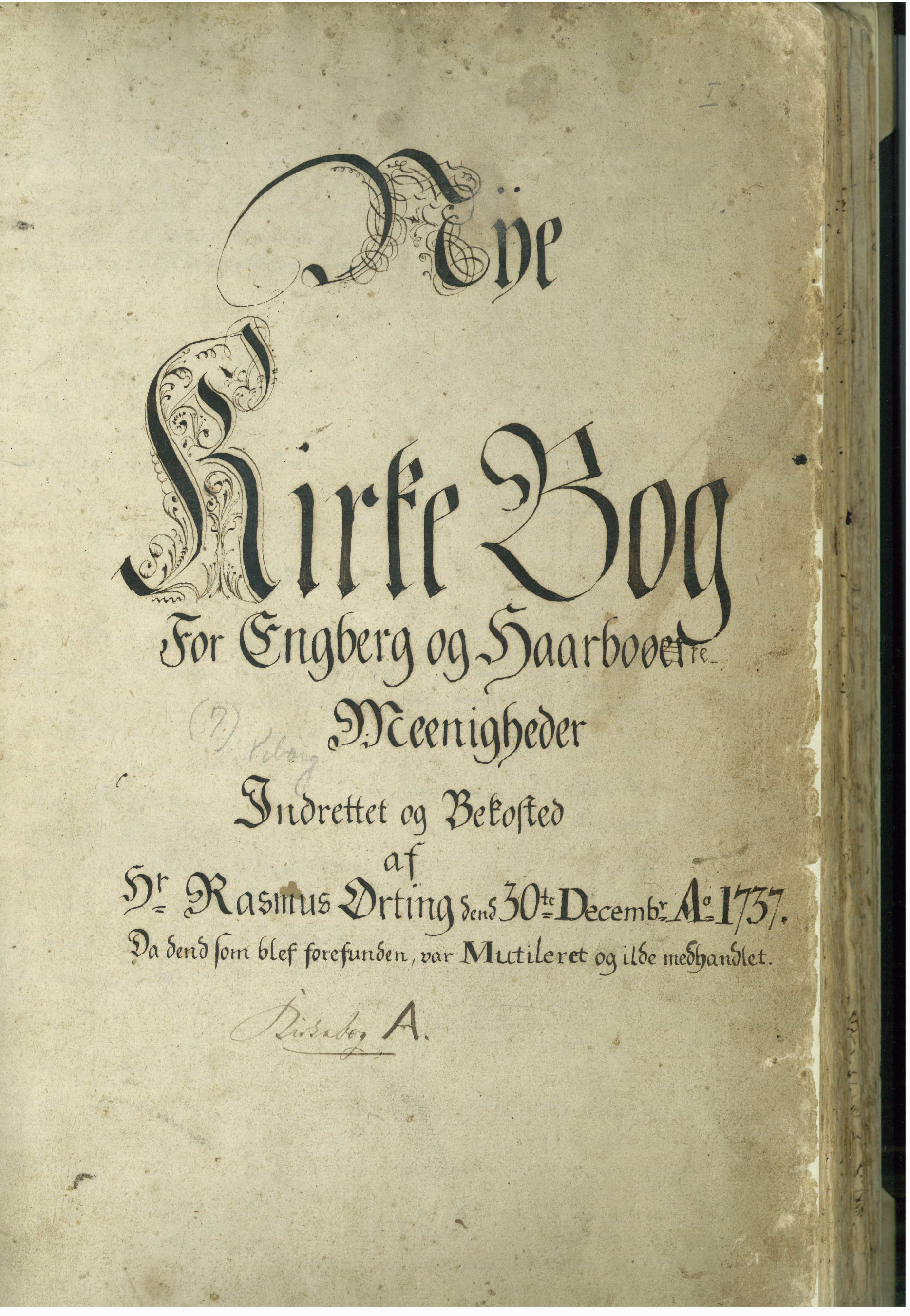 Harboøre sogn, 1738-1779